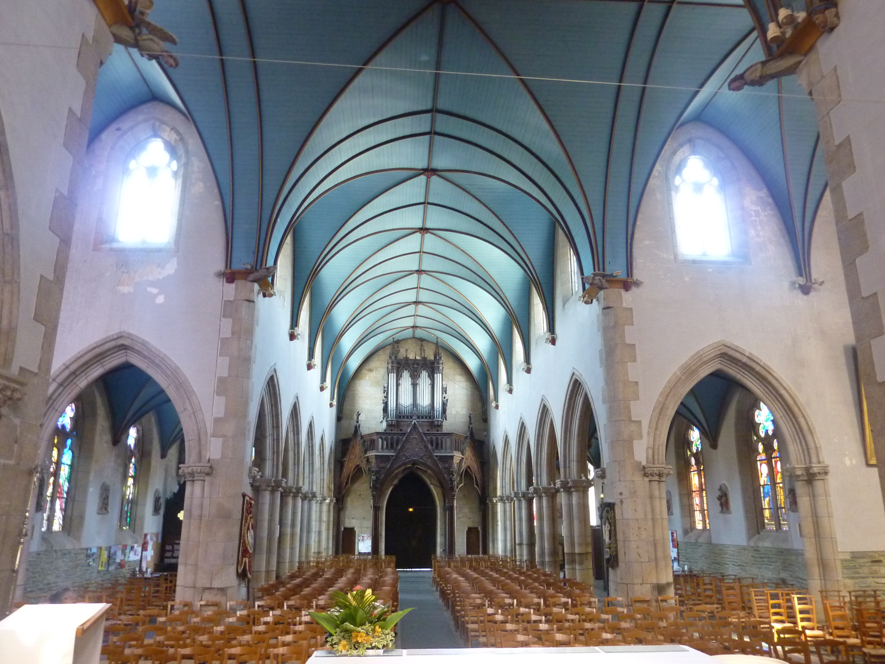 Châteaulin : église paroissiale Saint-Idunet, vue intérieure d'ensemble, la nef, et au fond l'orgue des frères Stoltz de 1885, restauré en 1990 par Alain Faye.